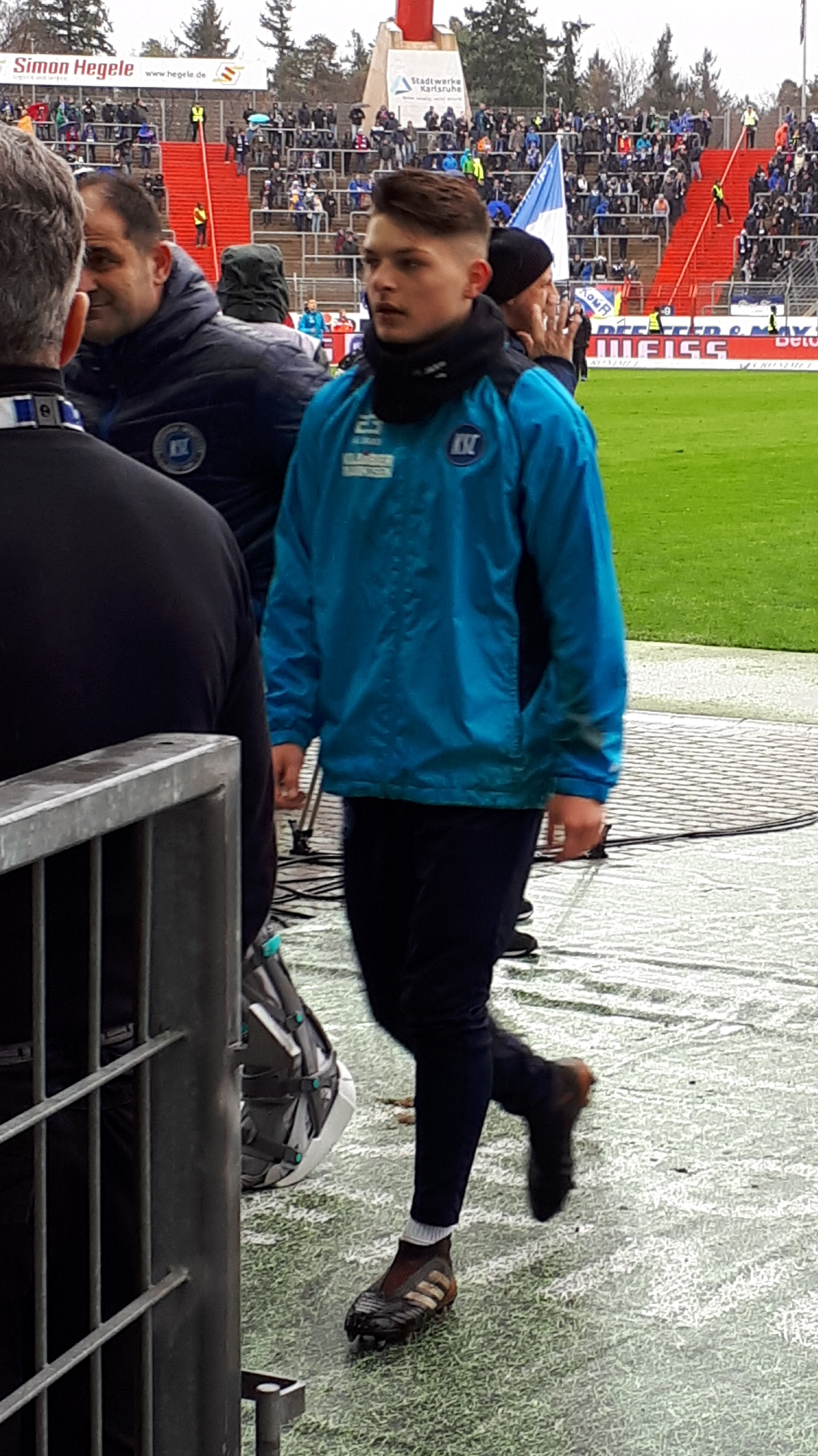 Fußballspieler Florent Muslija beim Heimspiel des Karlsruher SC gegen die SpVgg Unterhaching am 20. Januar 2018.